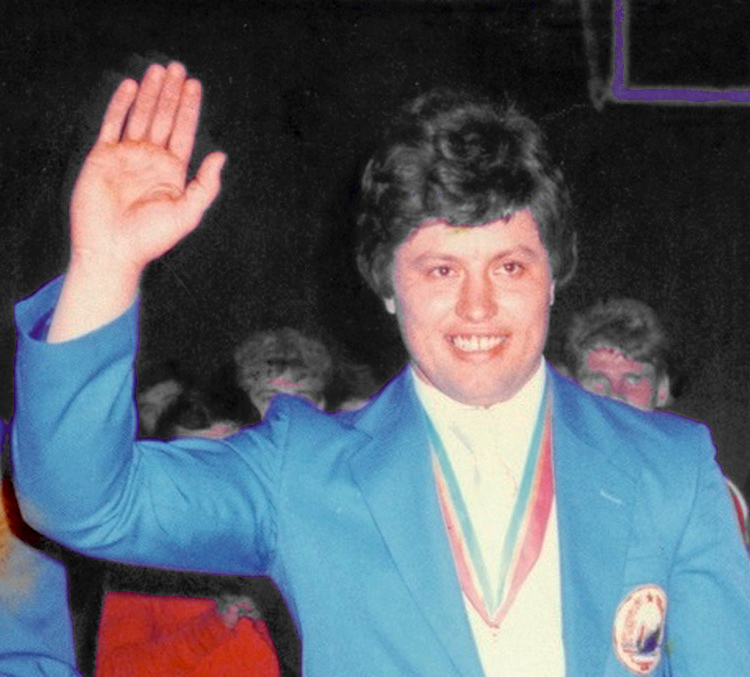 Petre Dumitru, 1984 Olympics